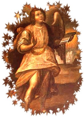 archange jehudiel